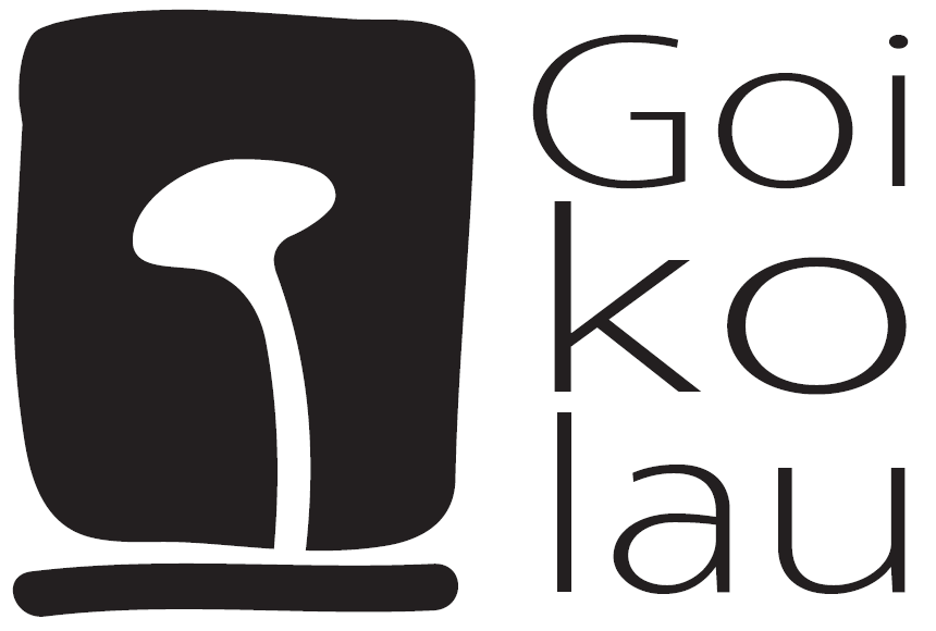 Goikolau elkartea feb logoa